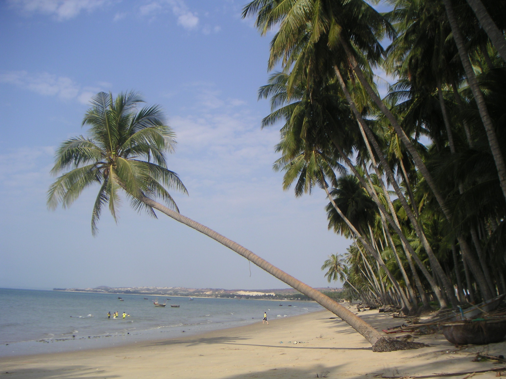 Beach at Mui Ne, Vietnam